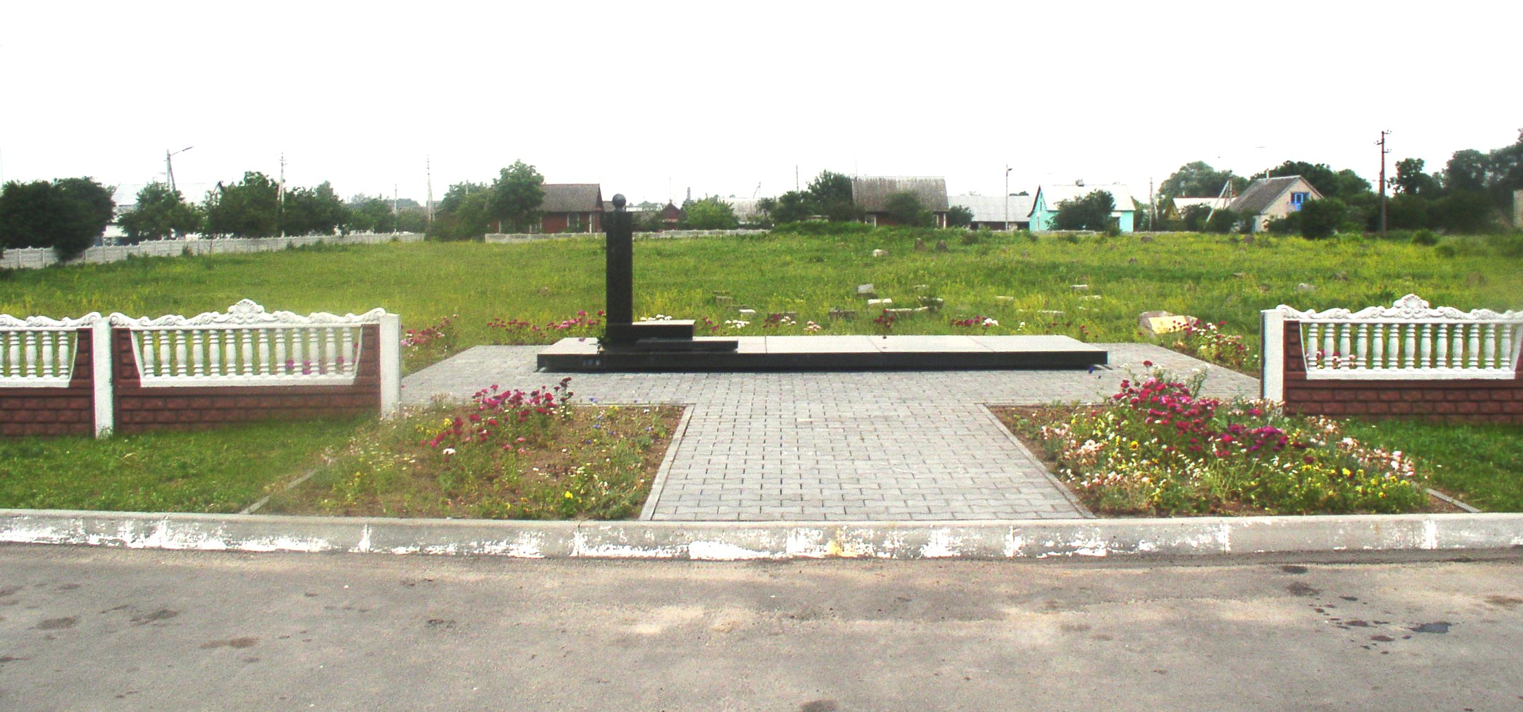 Памятник убитым евреям - жителям Пружан, Березы, Малеча, Шерешево, Сельца, Линово. Находится в Пружанах. Беларуская (тарашкевіца): Помнік забітым габрэям — жыхарам Пружаны, Бярозы, Малечу, Шарашова, Сяльца, Лінова. Знаходзіцца ў Пружанах.